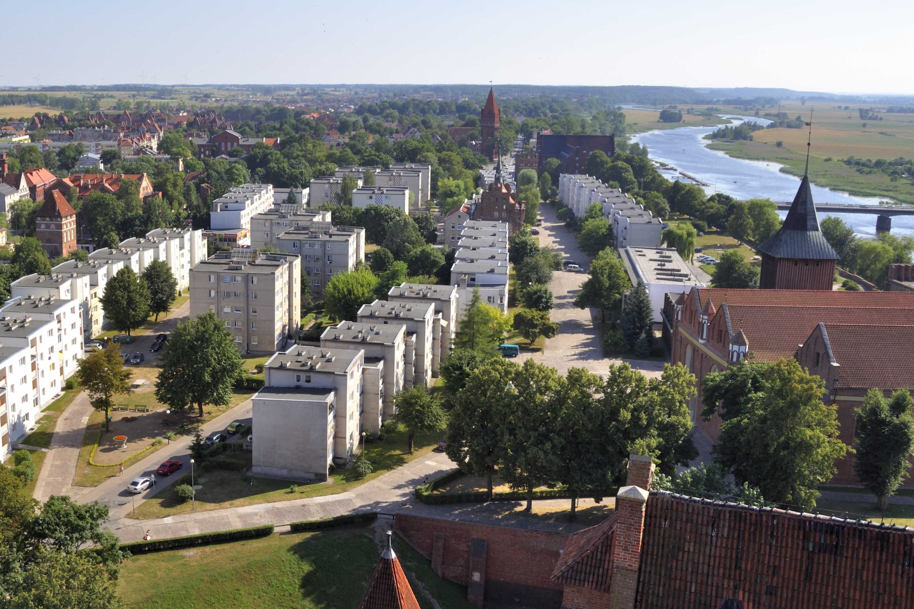 Teren Starego Miasta w Malborku.